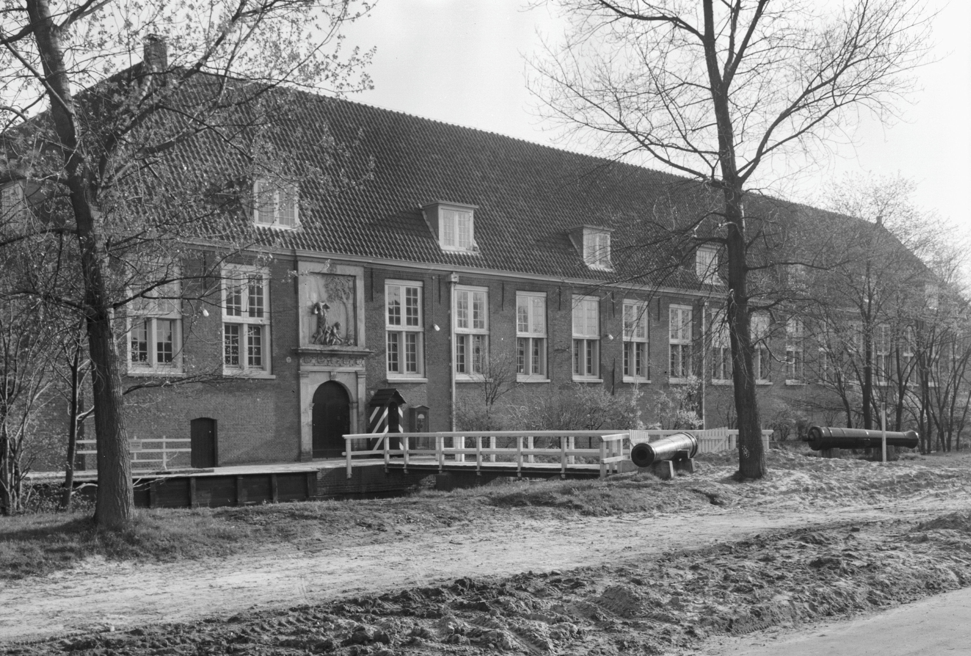 Pesthuis: pesthuislaan Legermuseum overzicht "Generaal Hoefer"